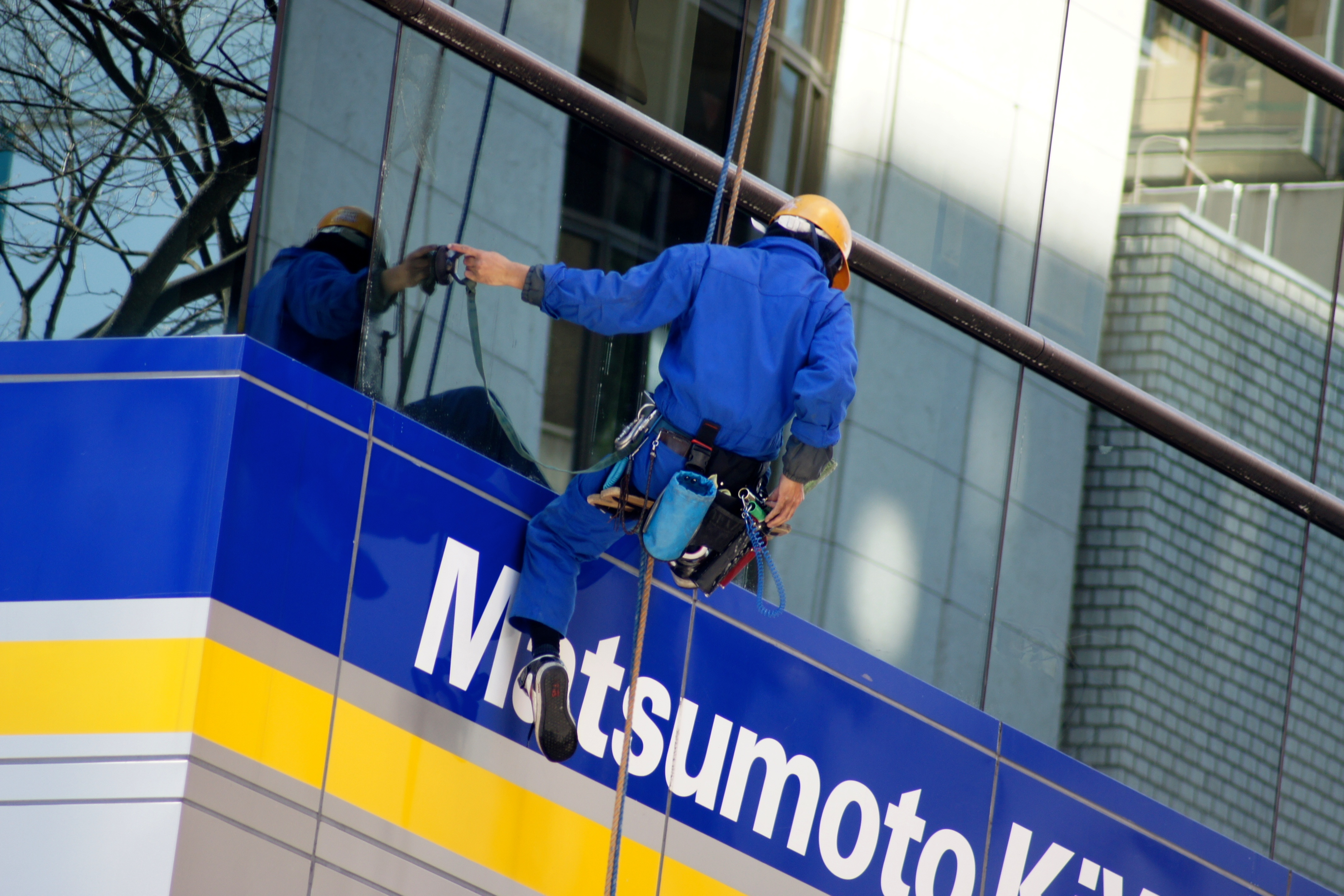 Spiderman a ginza 02-34-39